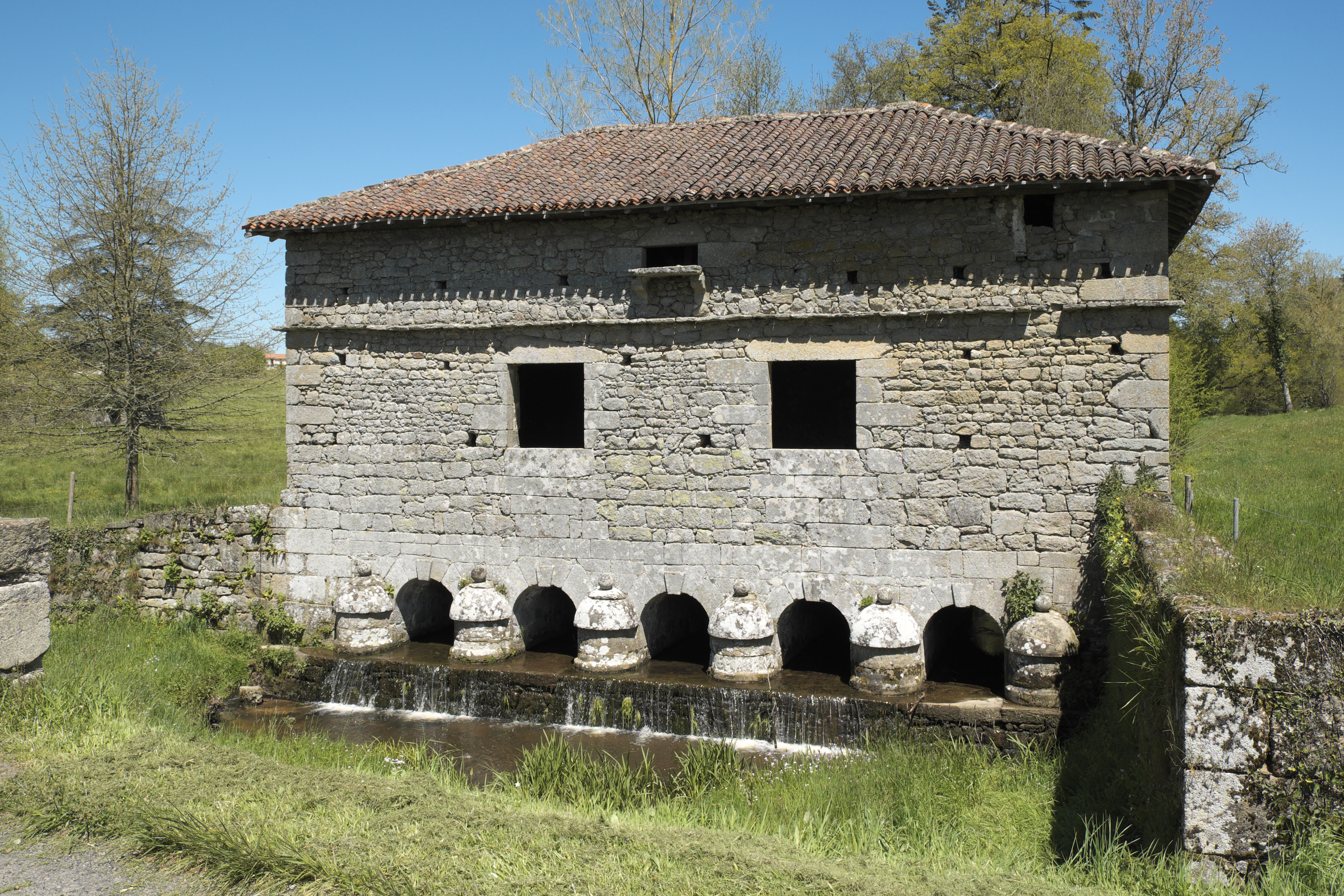 Pont-colombier (Brücke mit Taubenhaus) in Veyrac im Département Haute-Vienne (Limousin/Frankreich)